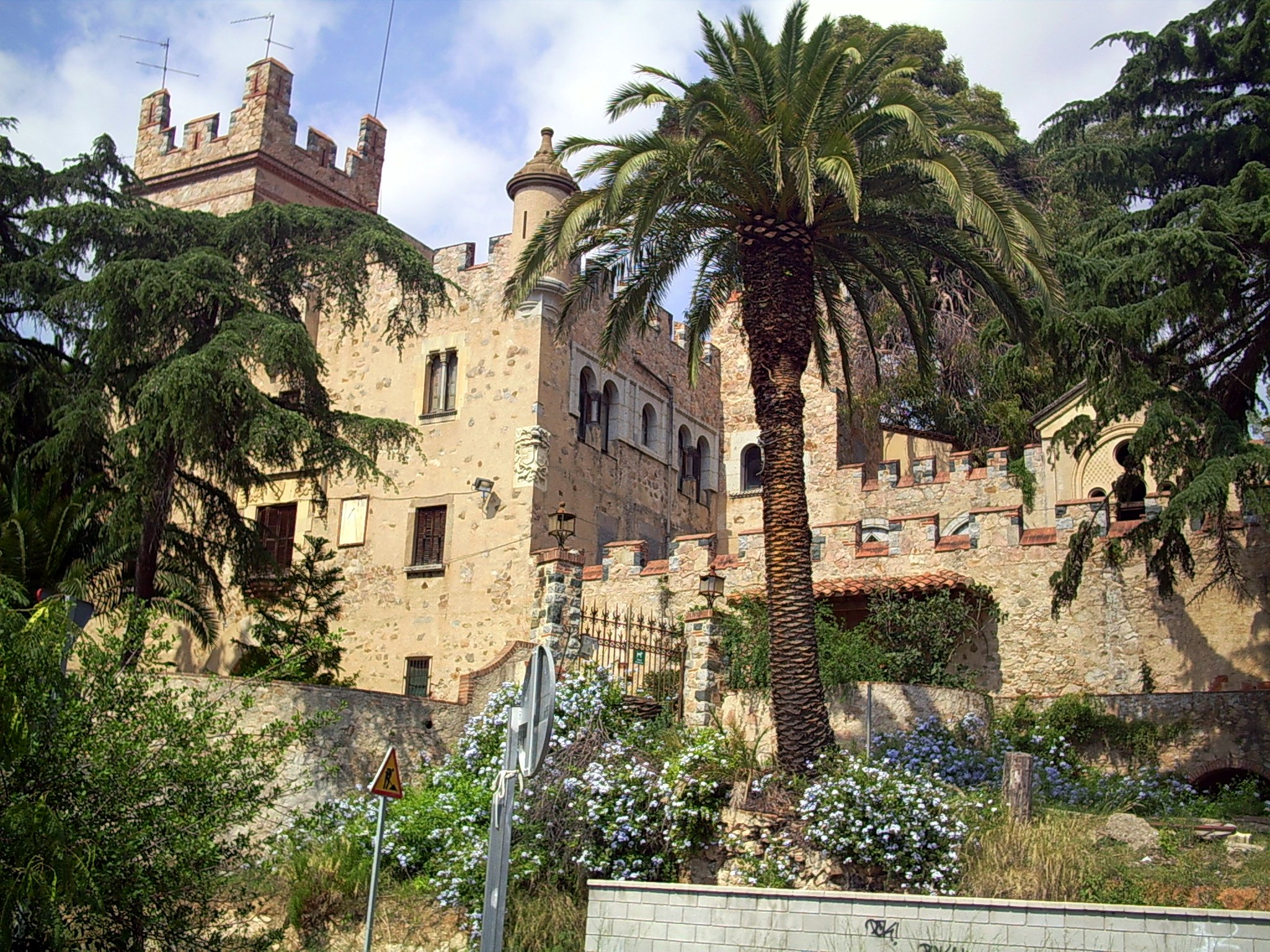 Castell de Can Jaumar, a Cabrils, Edificat per en Jaume Bofarull, el 1923.